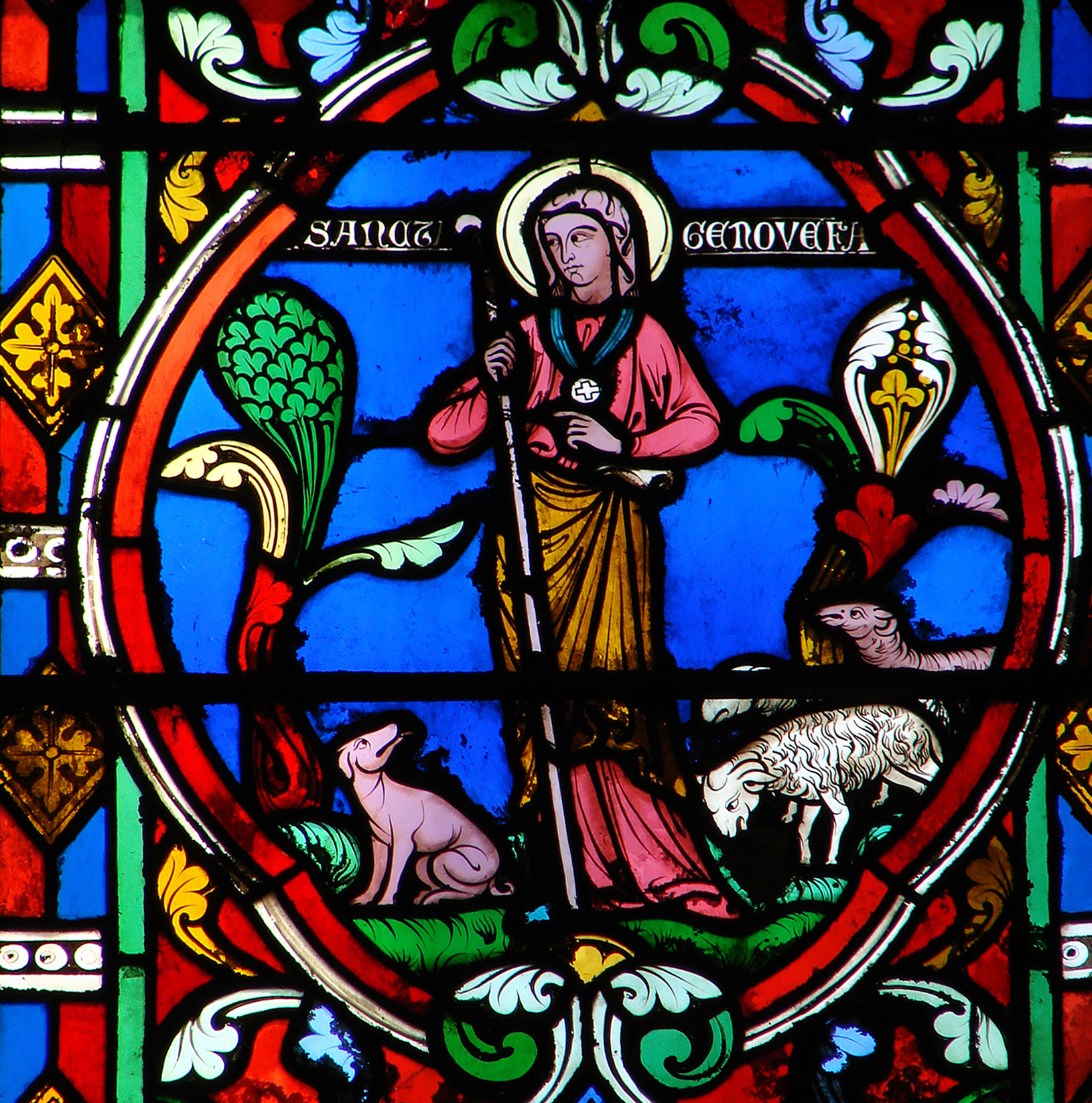 Détail d'un vitrail néogothique de la cathédrale de Meaux, daté de 1869, présentant des scènes de la vie de Sainte Geneviève.